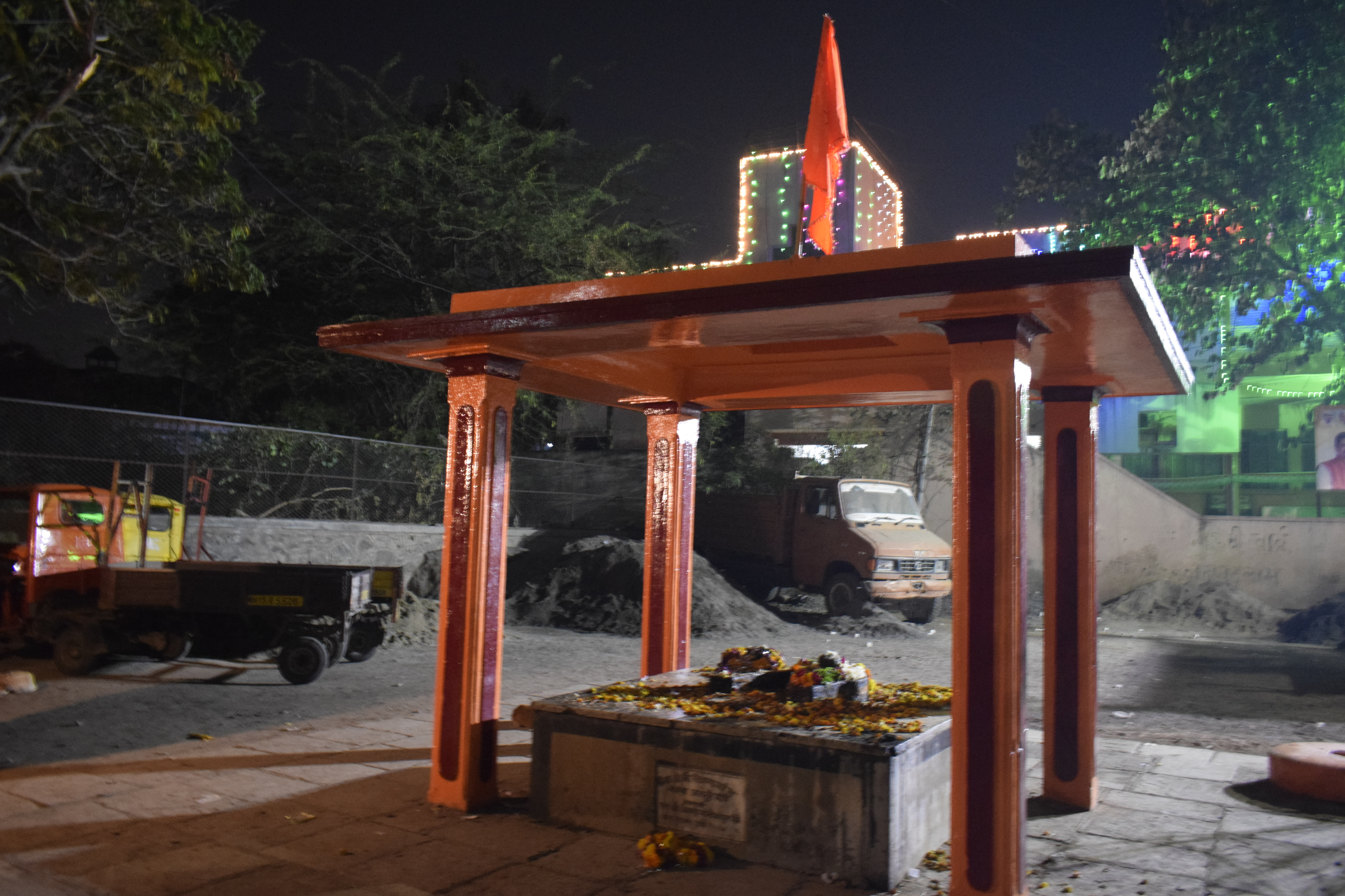 श्री उमामहेश्वर लिंग